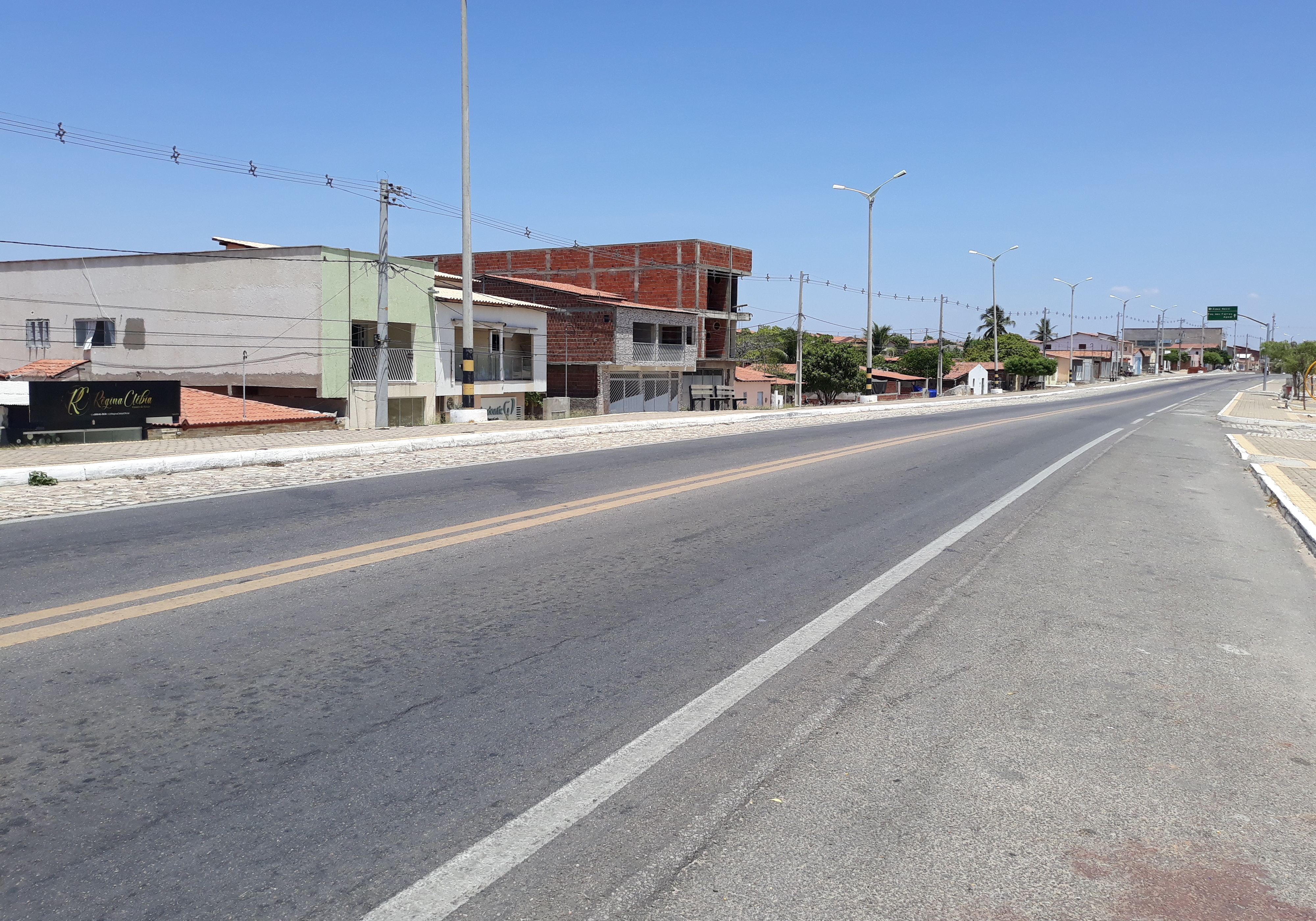 BR-405 na Avenida Egídio Chagas do Nascimento na cidade de Rafael Fernandes, no Rio Grande do Norte (Brasil)